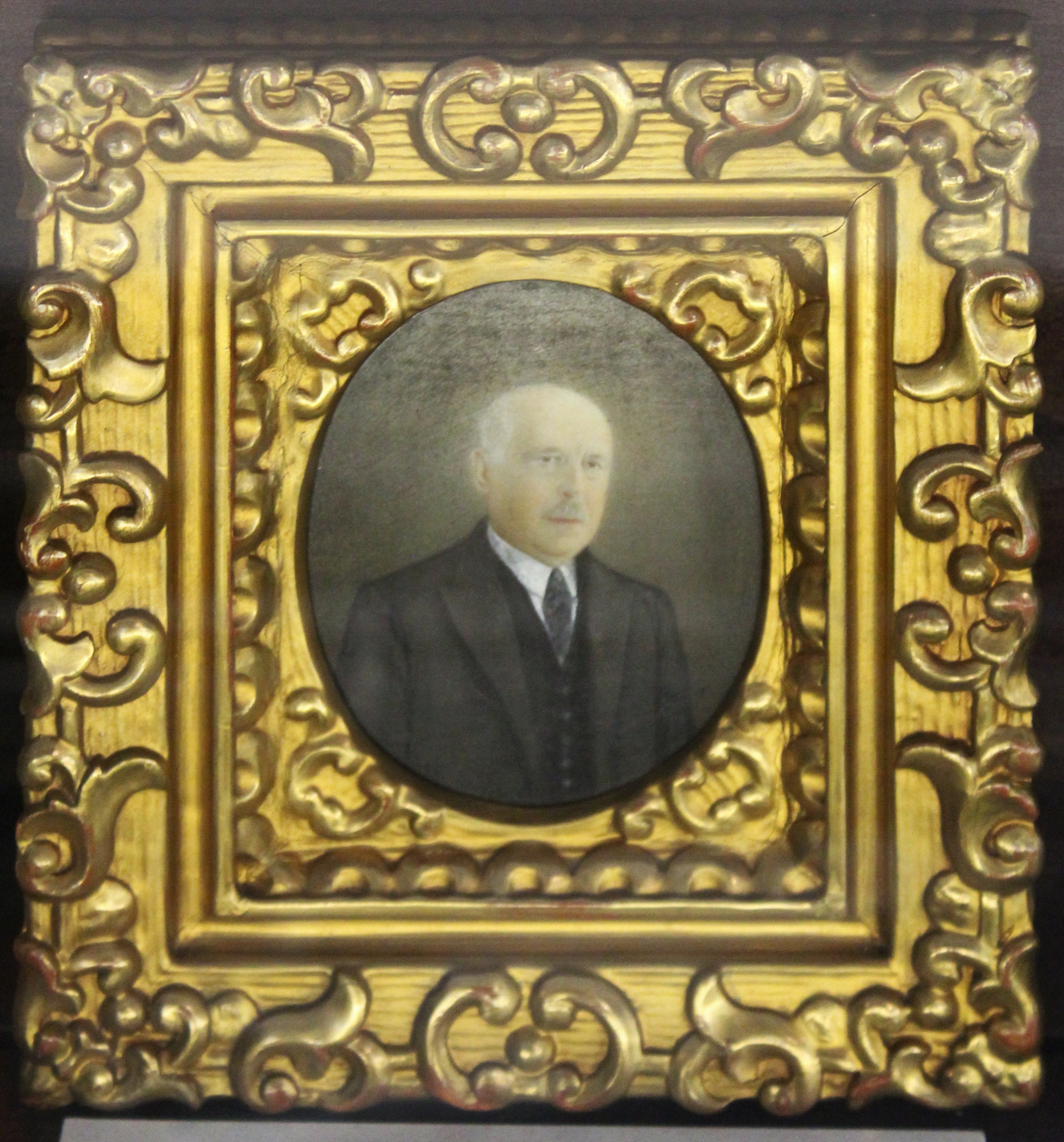 Černínové. Diplomaté, cestovatelé, sběratelé - výstava na zámku v Jindřichově Hradci